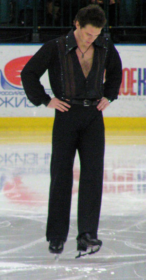 Alexei Tikhonov während der Russischen Meisterschaften 2005